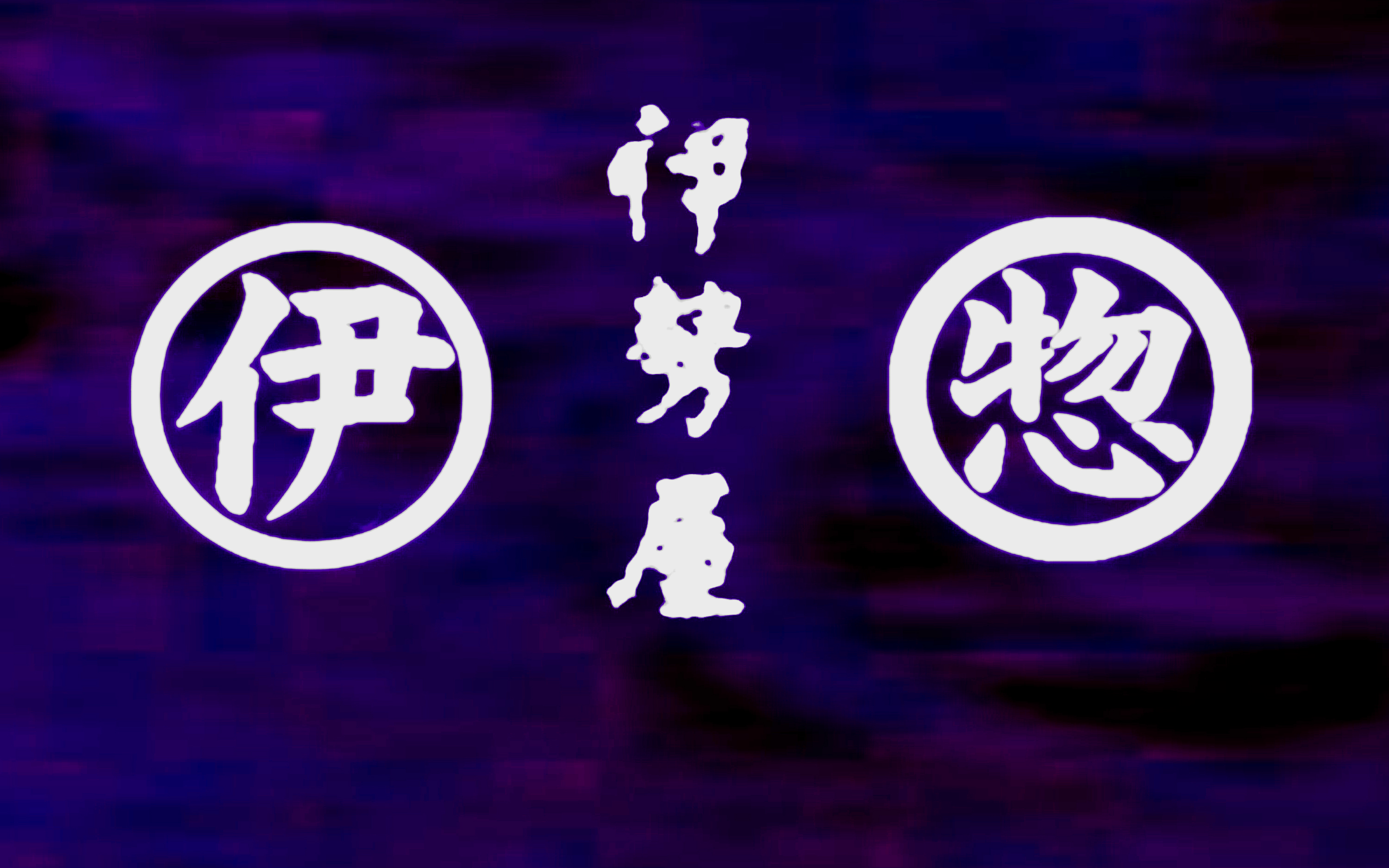 粕壁宿伊勢屋・伊勢惣 暖簾